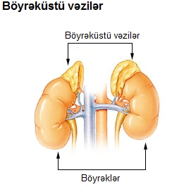 Böyrəküstü vəzilər - lat. glandulae suprarenales cüt daxili sekresiya vəzilərindən olub, böyrəklərin yuxarı ucları üzərində yerləşmişdir. Sağ vəzi üçbucağa və sol vəzi ayparaya bənzəyir; səthləri qabarıqdır, rəngləri sarımtıl və konsinstensiyaları yumuşaqdır. Böyüklərdə hər vəzinin çəkisi 11-18 q (ya 7-20 q) olur; uzunluğu 4-6 sm, eni 2-3 sm və qalınlığı 3-6 mm-dir.